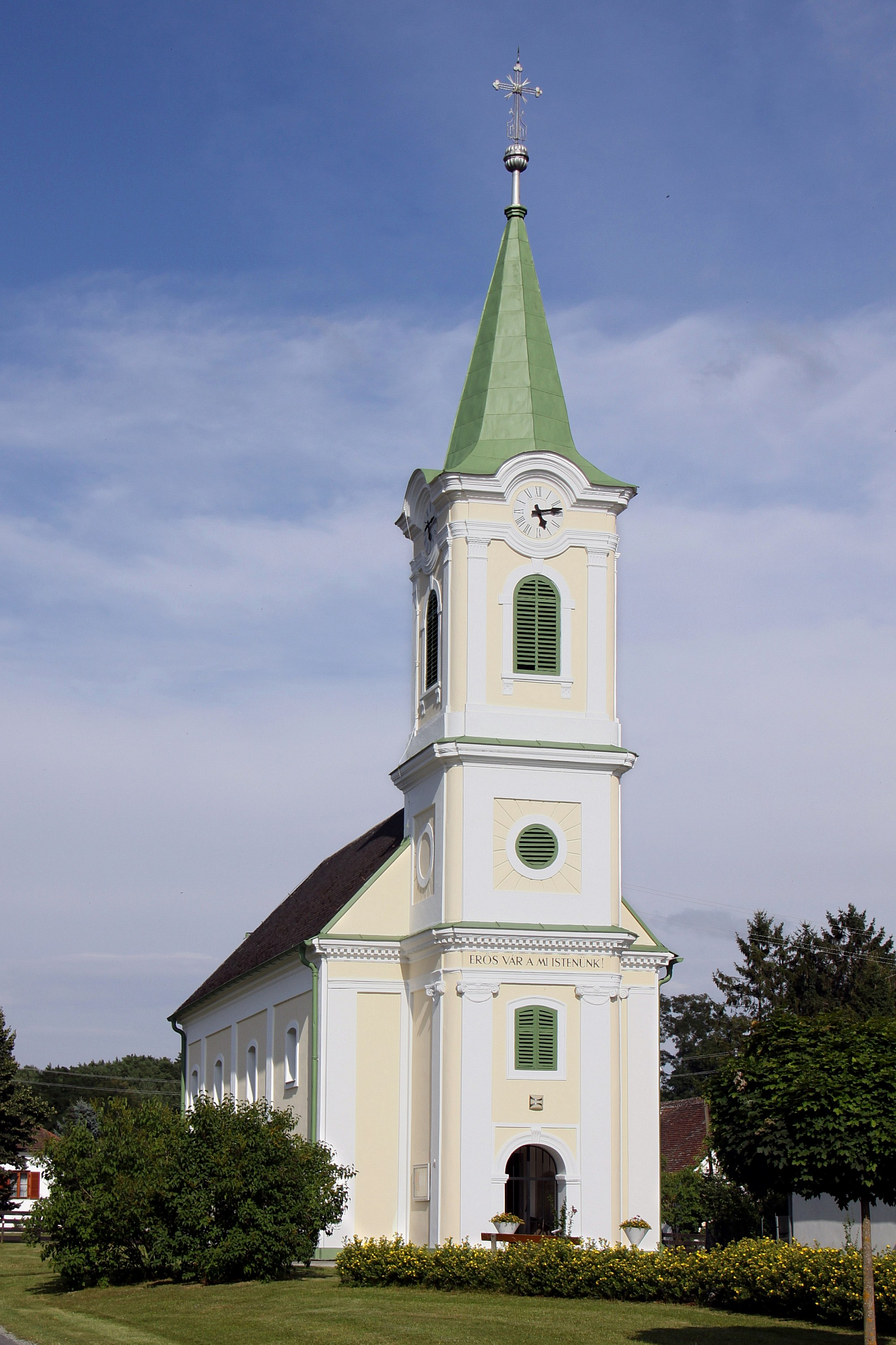 Denkmalgeschützte evangelische Pfarrkirche in Siget in der Wart, Gemeinde Rotenturm an der Pinka Object location47° 15′ 40.65″ N, 16° 16′ 51″ E